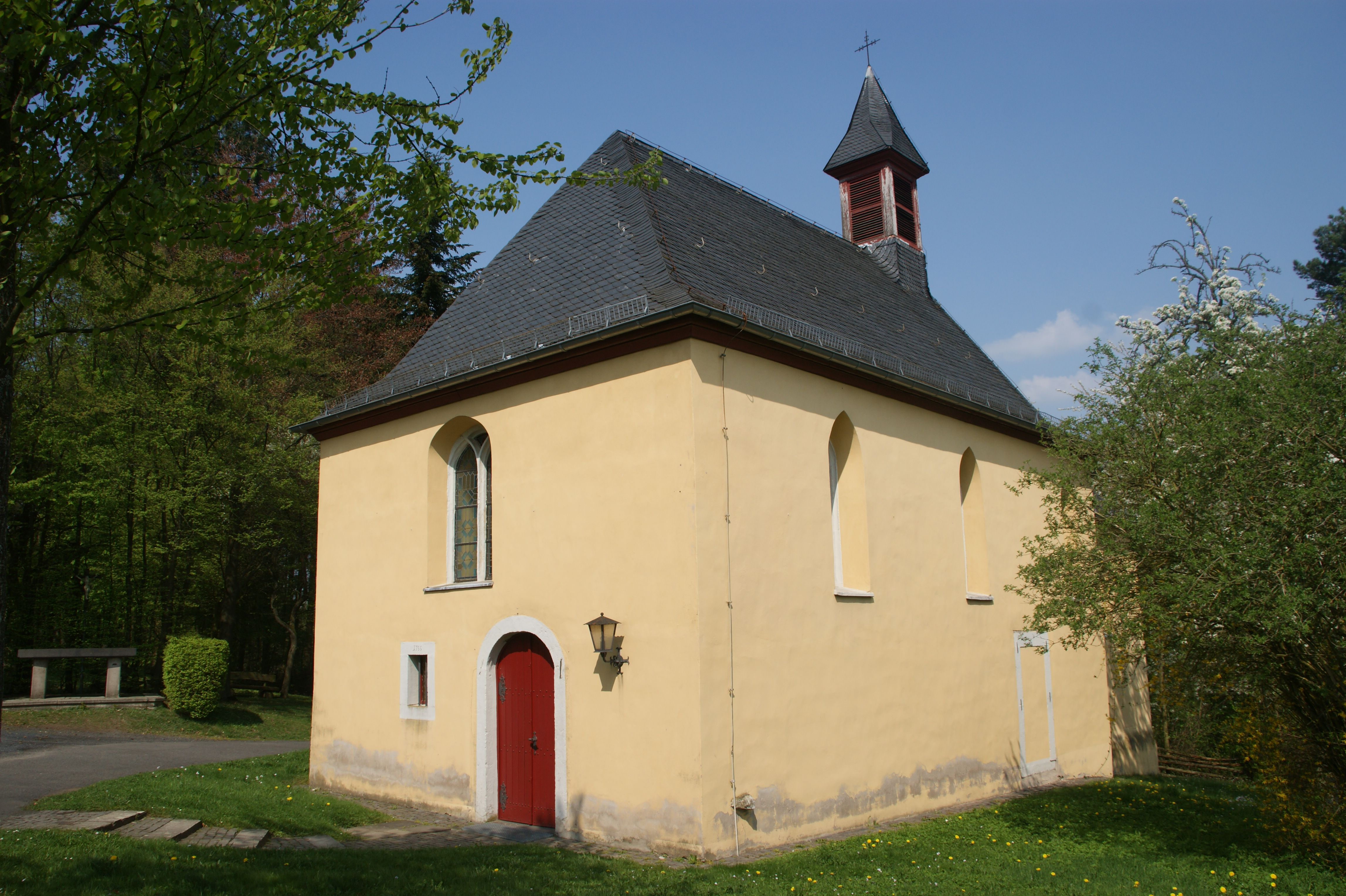 Servatiuskapelle bei Aegidienberg, Bad Honnef